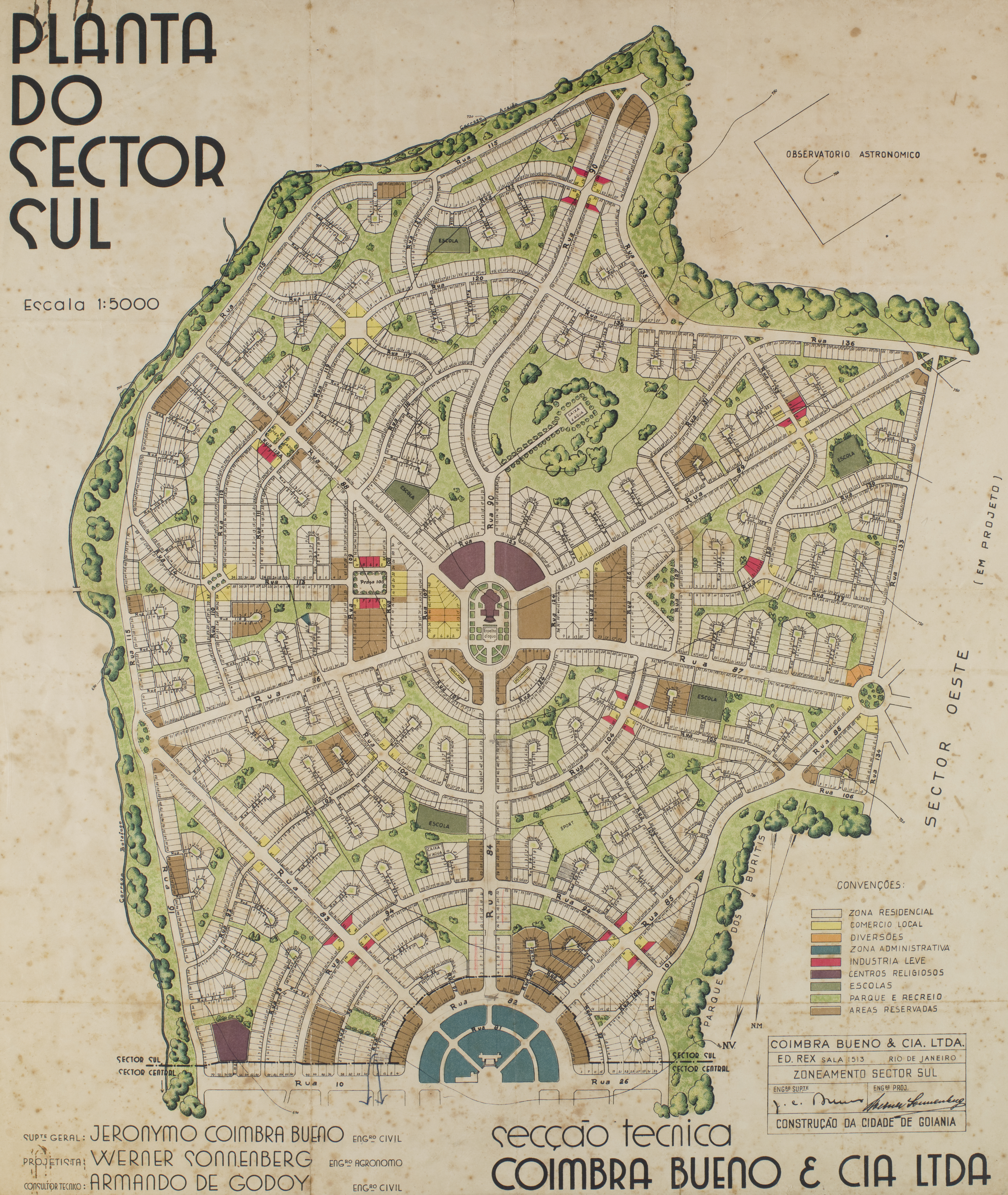 Obra que integra o acervo do Museu Paulista da USP. Coleção João Baptista de Campos Aguirra - Ref. Agente: Seção Técnica Coimbra Bueno & Cia Ltda